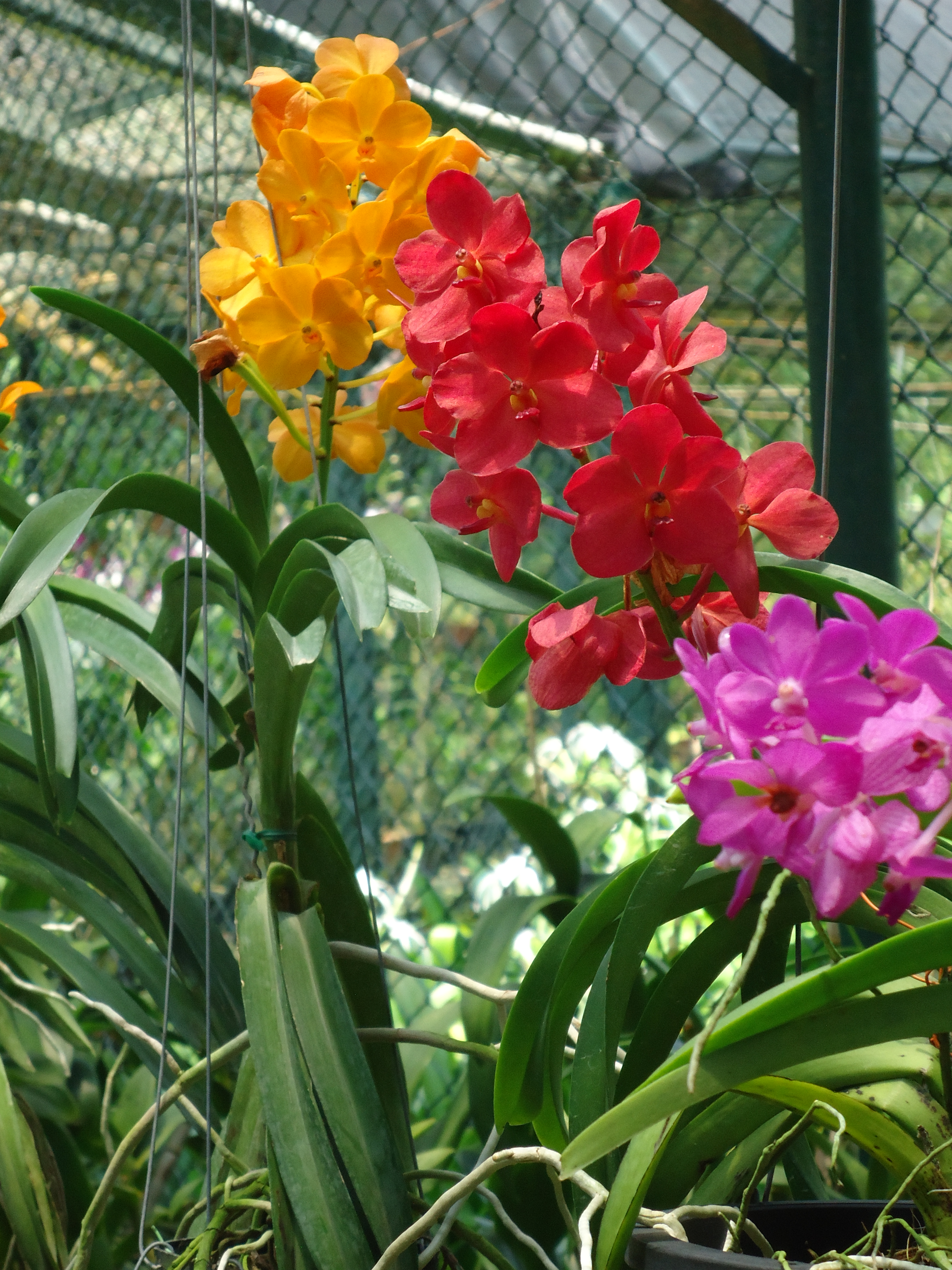 Penang Botanic Gardens